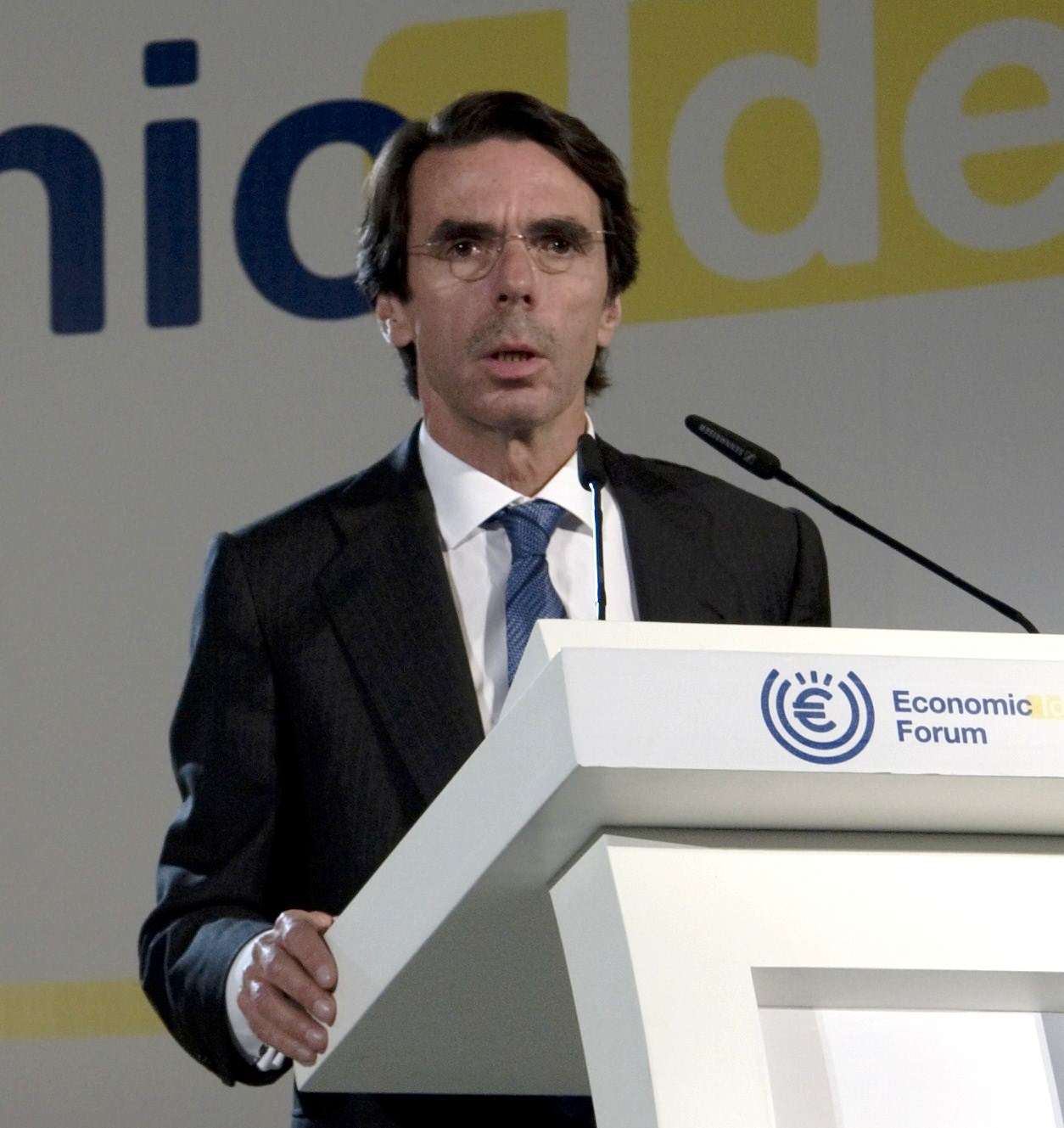 José María Aznar, ex-presidente español, en 2010.